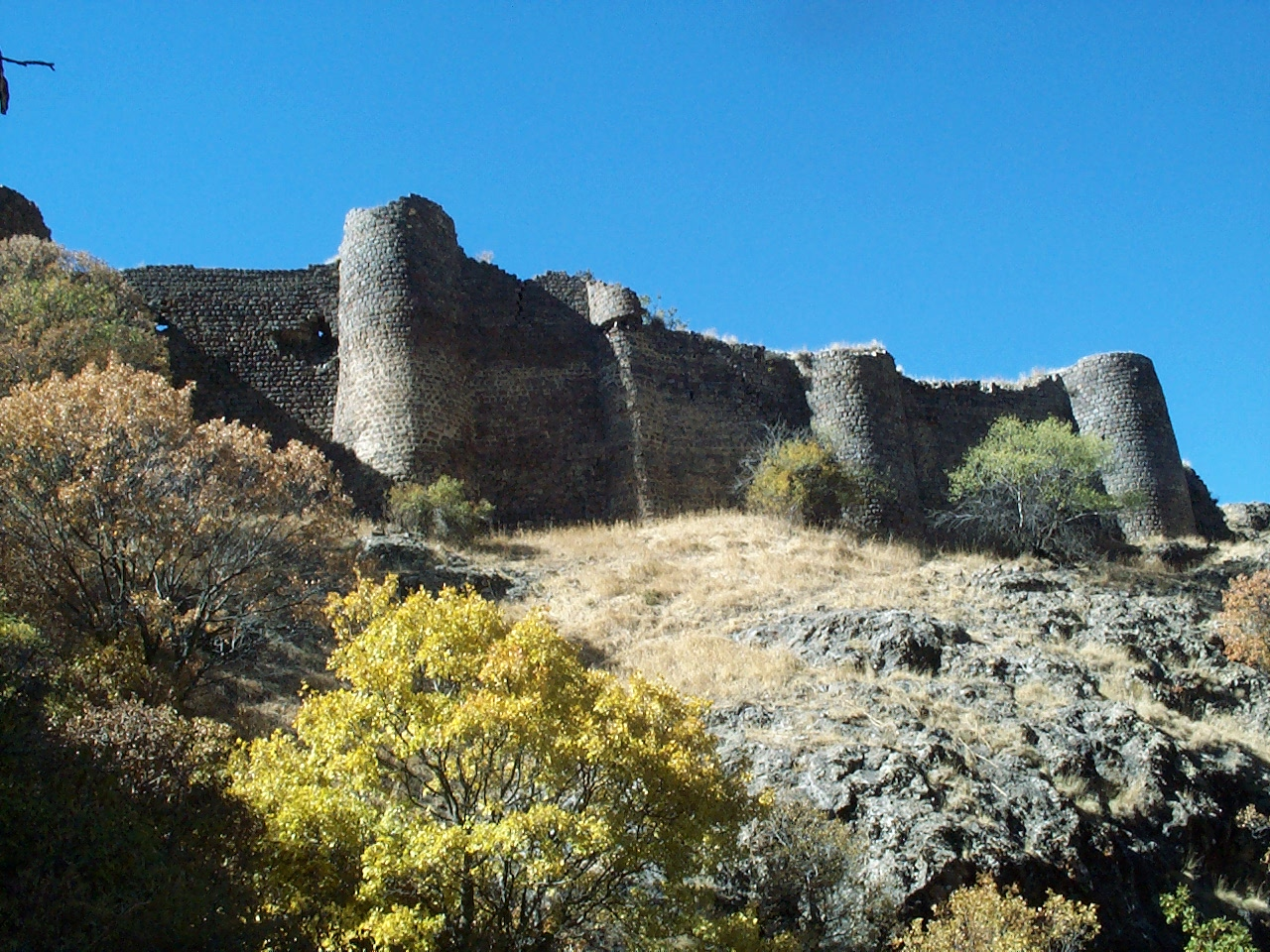 ԱՄՐՈՑ «ԿԱՔԱՎԱԲԵՐԴ» («ԹԱԹՈՒԼԻ ԲԵՐԴ») 98.6/1